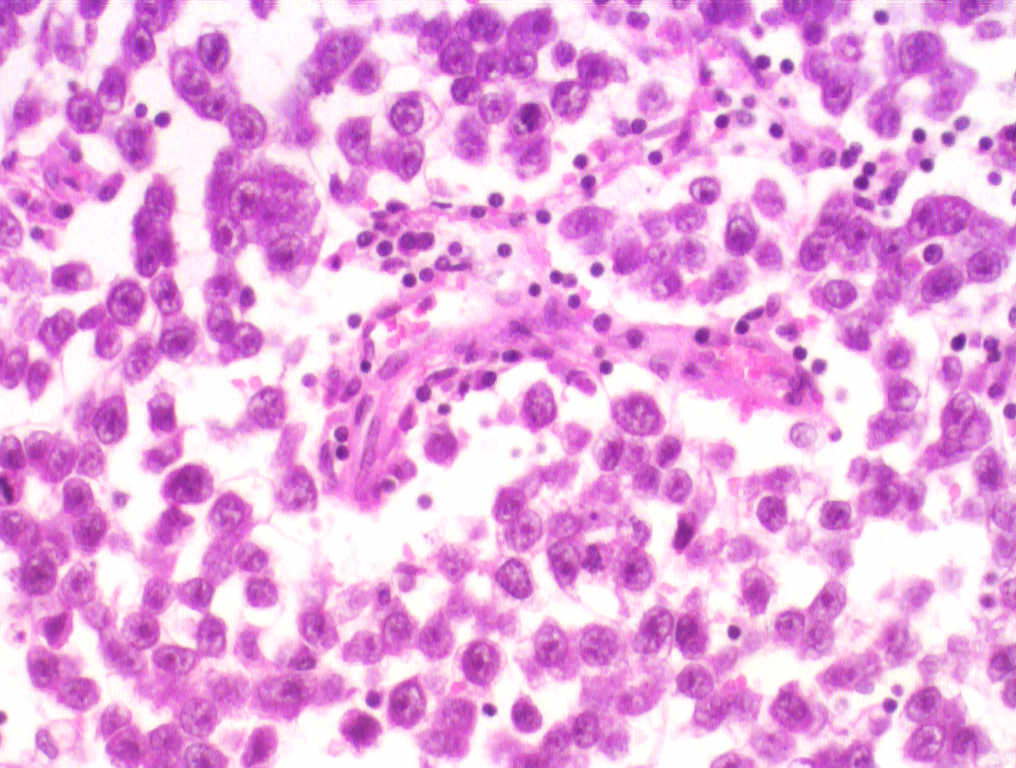 testis, seminoma. H&E 200x